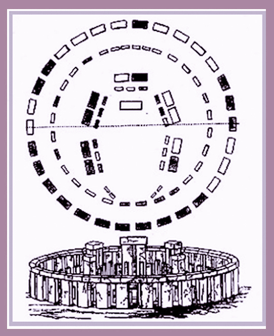 Stonehenge : A belső körök helyszínrajza a megmaradt kövek jelölésével